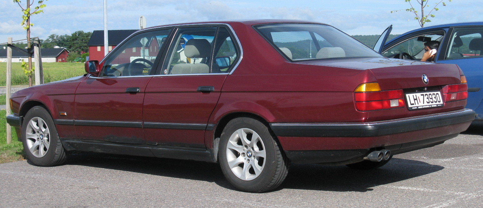 BMW 7 Series E32